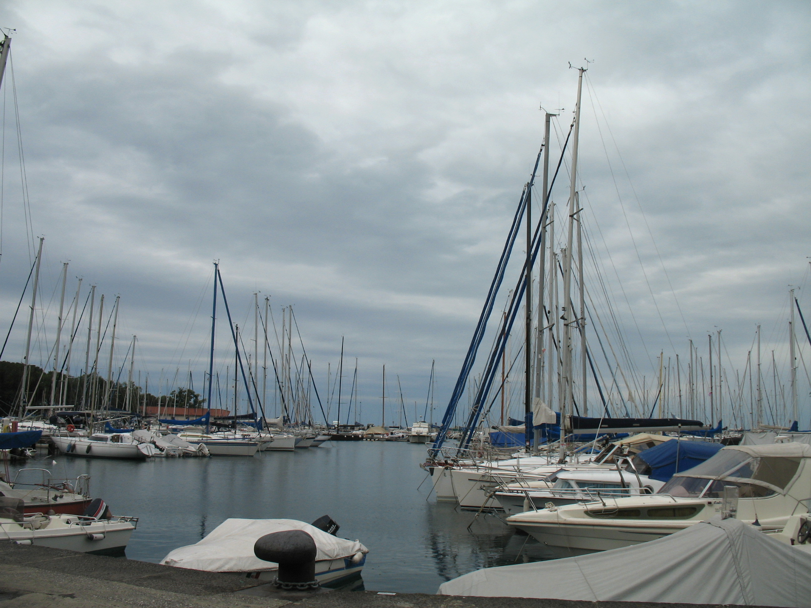 Sistiana, frazione di Duino-Aurisina, provincia di Trieste, Friuli-Venezia Giulia, Italia.